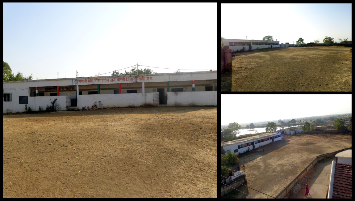 hi:बंडोल: सरस्वती शिशु मंदिर बंडोल